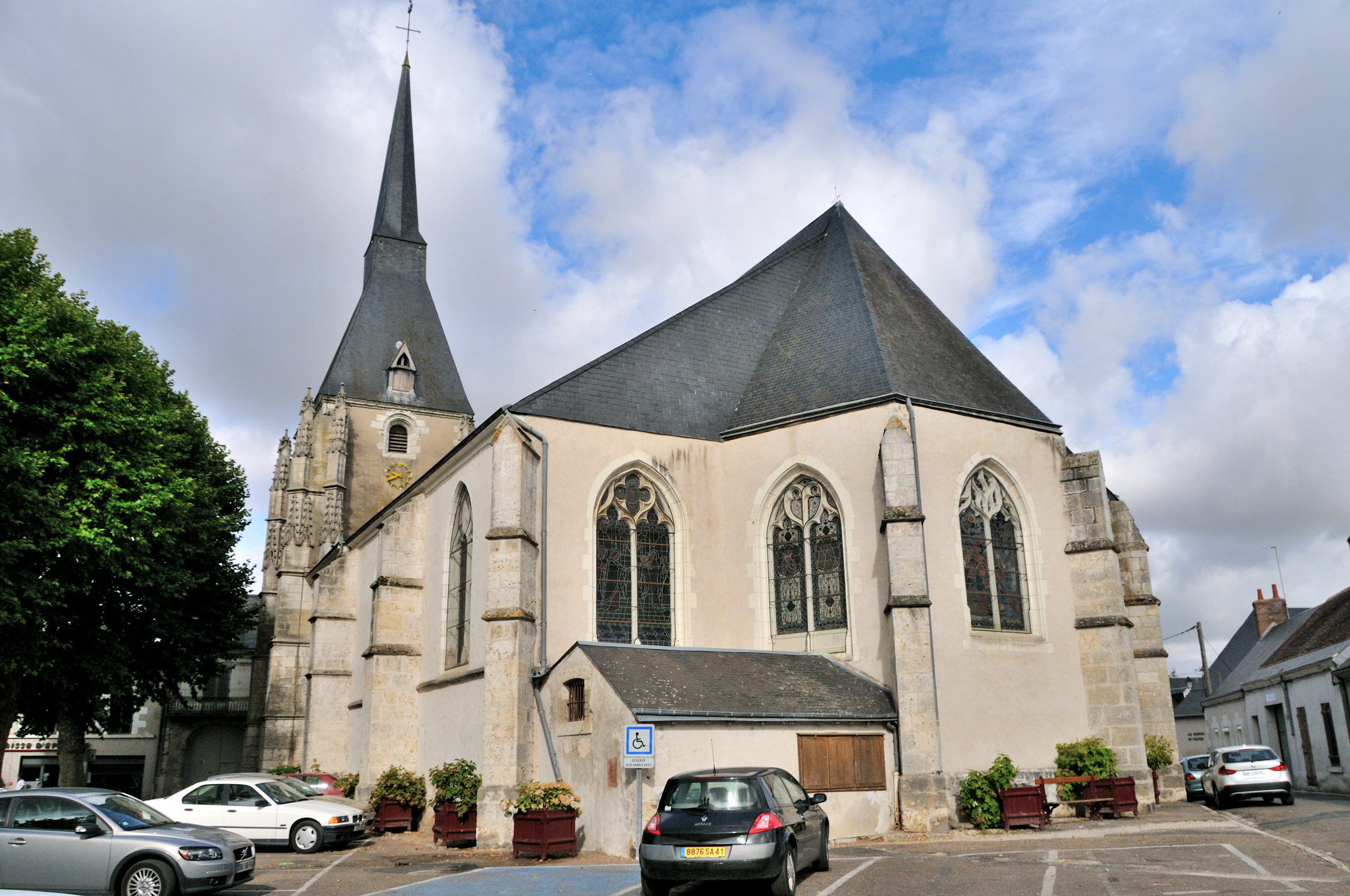 Église Saint-Gervais-et-Saint-Protais, Onzain, Loir-et-Cher, France